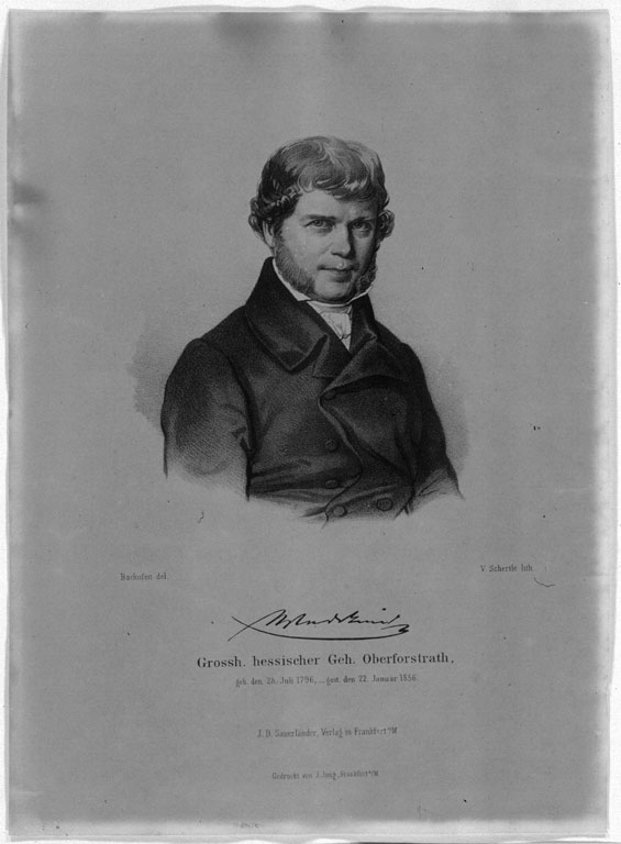 Der Forstmann Georg Wilhelm Freiherr von Wedekind (1796-1856), "Grossh. hessischer Geh. Oberforstrath, geb. den 28. Juli 1796, gest. den 22. Januar 1856, Backofen del. V. Schertle lith."